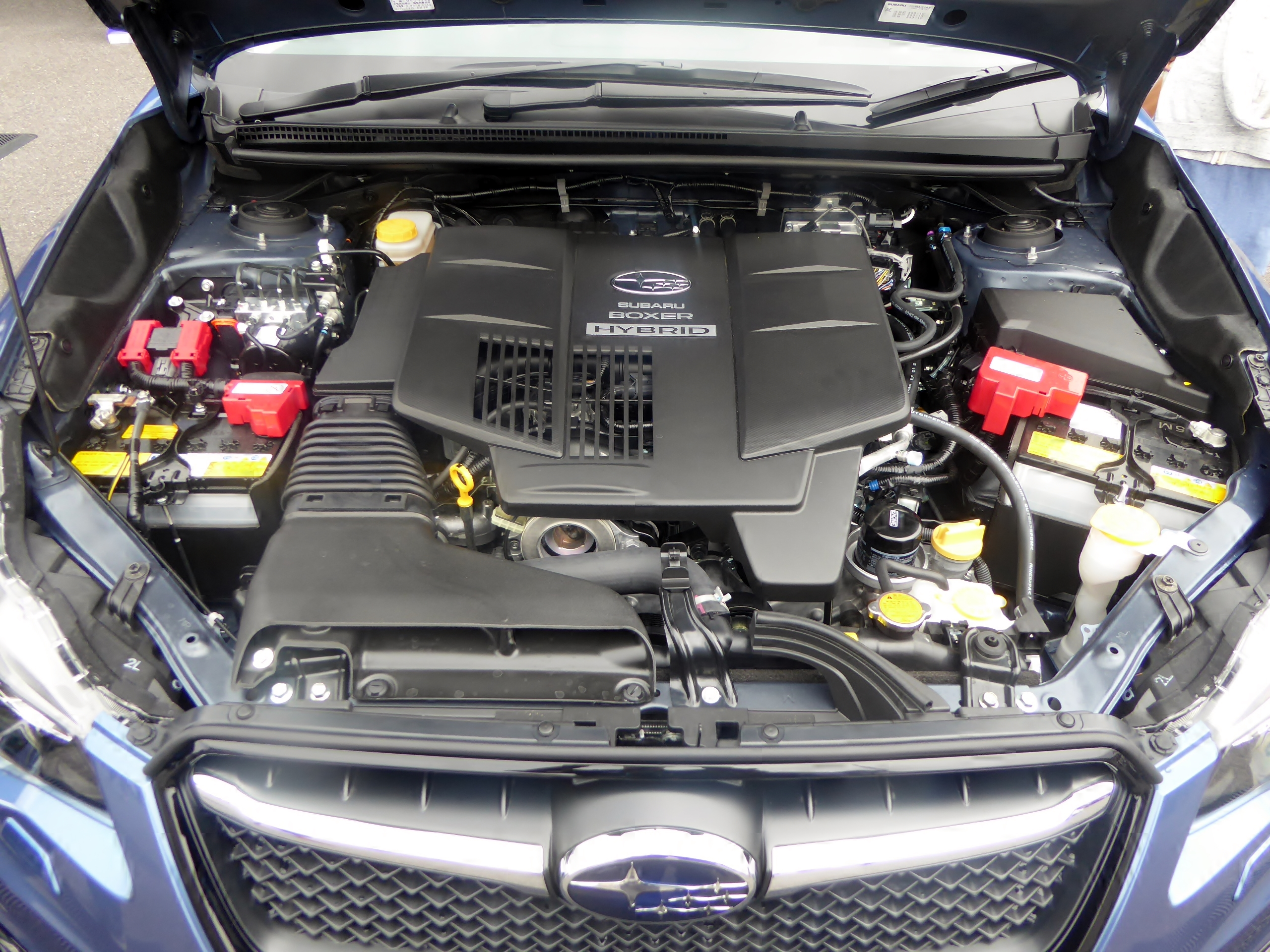 DAA-GPE型スバル・インプレッサスポーツハイブリッド2.0i-Sアイサイトのエンジンルームを撮影。